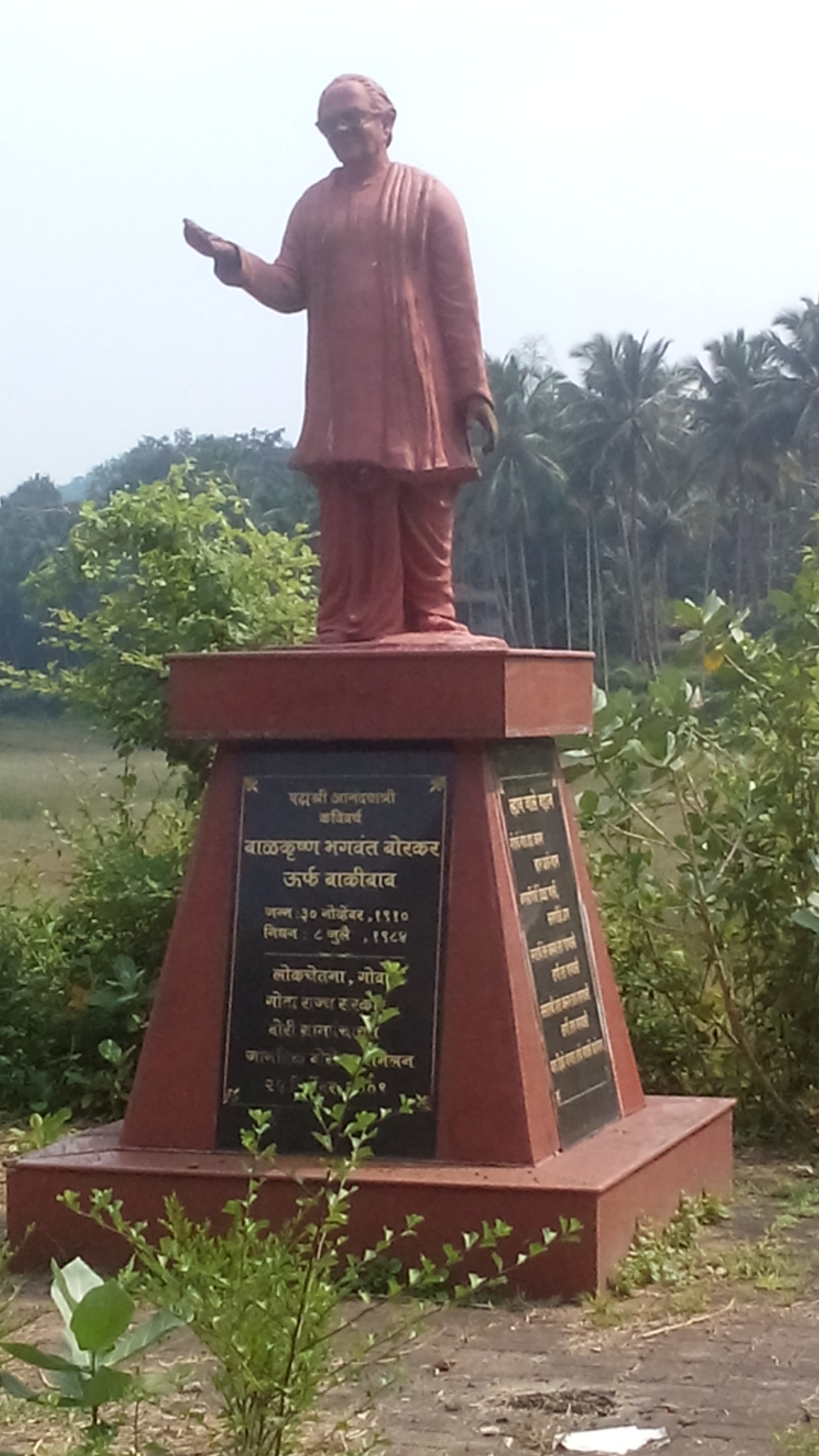 बाळकृष्ण भगवंत बोरकर स्मारक